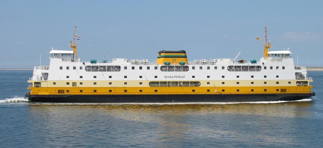 Old 1991 Ferry from Den Helder to Texel